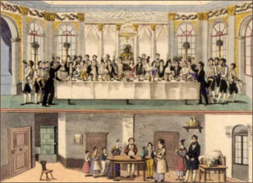 Szenenbild aus "Zu ebener Erde und erster Stock" von Johann Nepomuk Nestroy